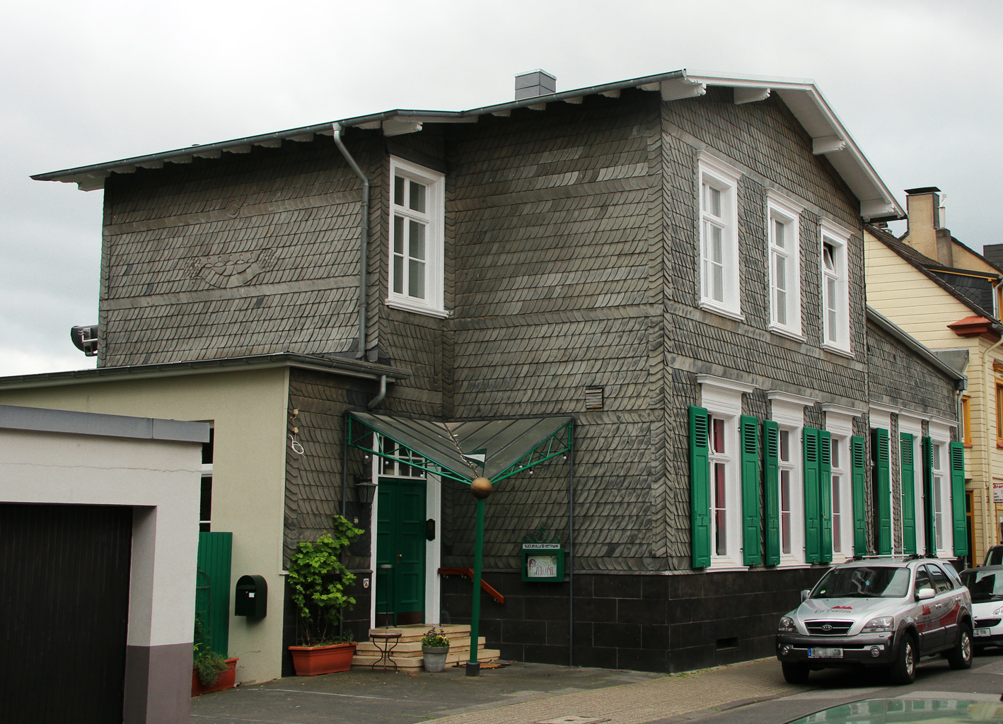 Ehemaliges Vereinsgebäude des Gesellschaft Vereins zu Mettmann, Beckershoffstraße